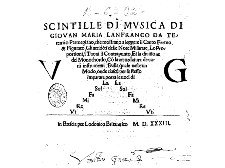 Scintille di musica, traité de musique de Giovanni Maria Lanfranco, imprimée à Brescia en 1533 - page de titre